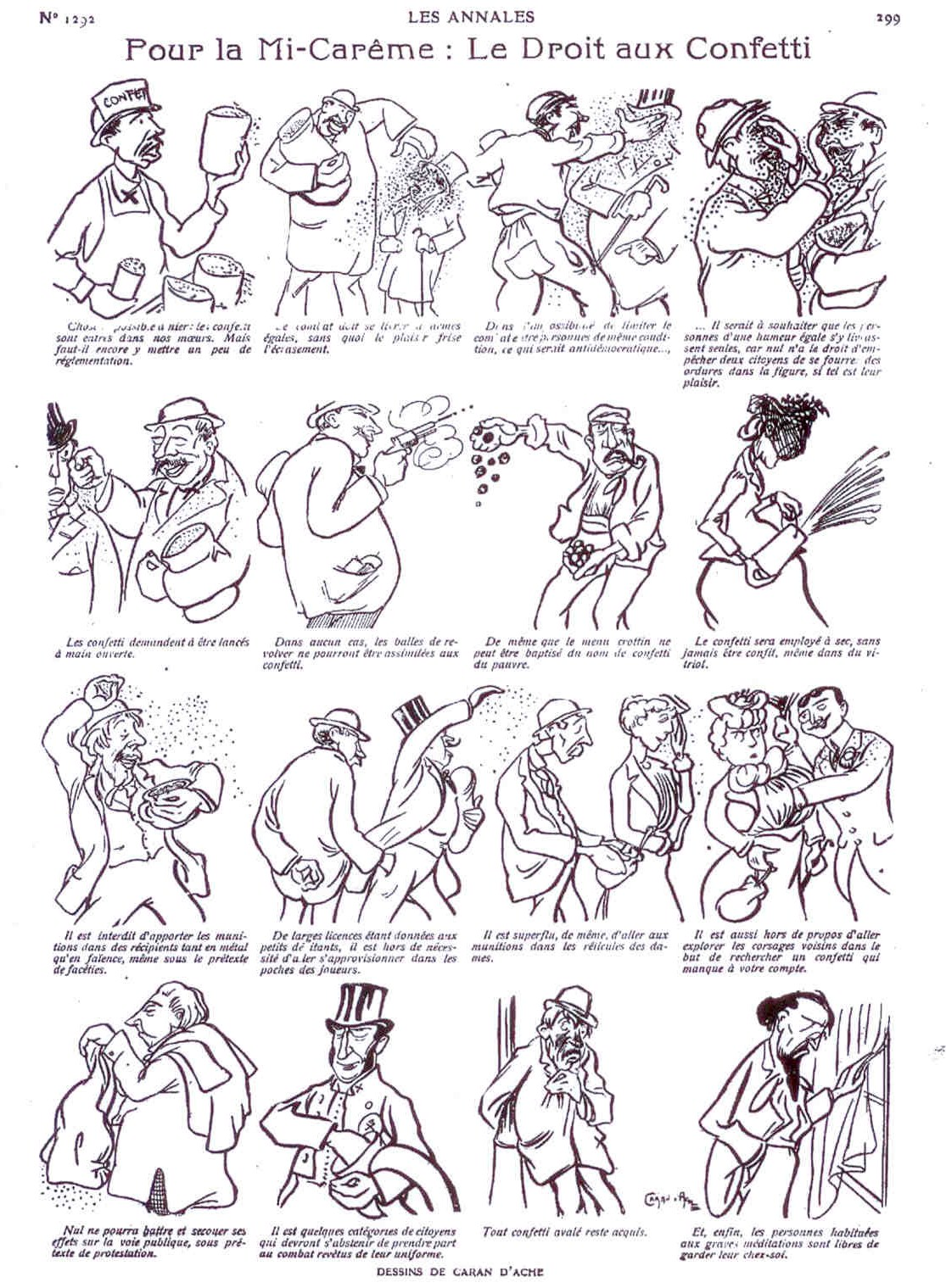 Planche de dessins humoristiques de Caran d'Ache à propos des confettis.